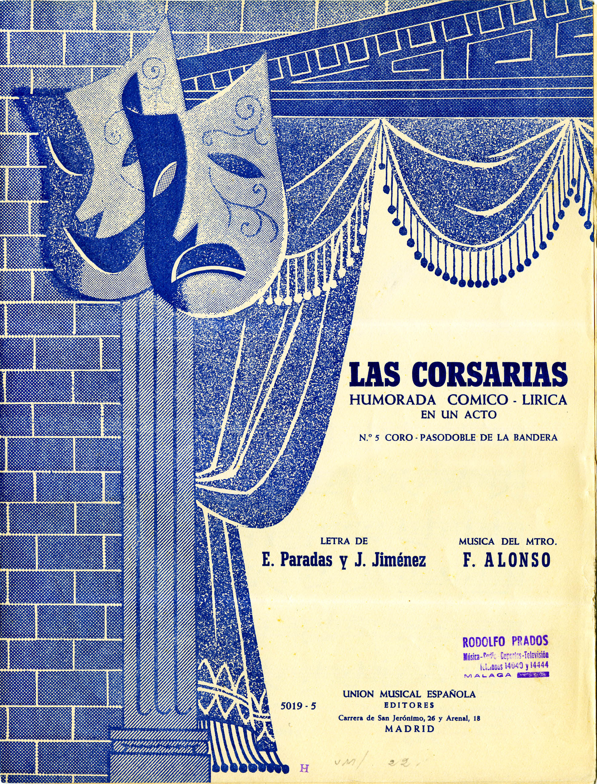 Portada de una partitura de la zarzuela Las corsarias. Los libretistas fueron E. Paradas y J. Jiménez con música de Francisco Alonso. Editado por La Unión Musical en 1920.